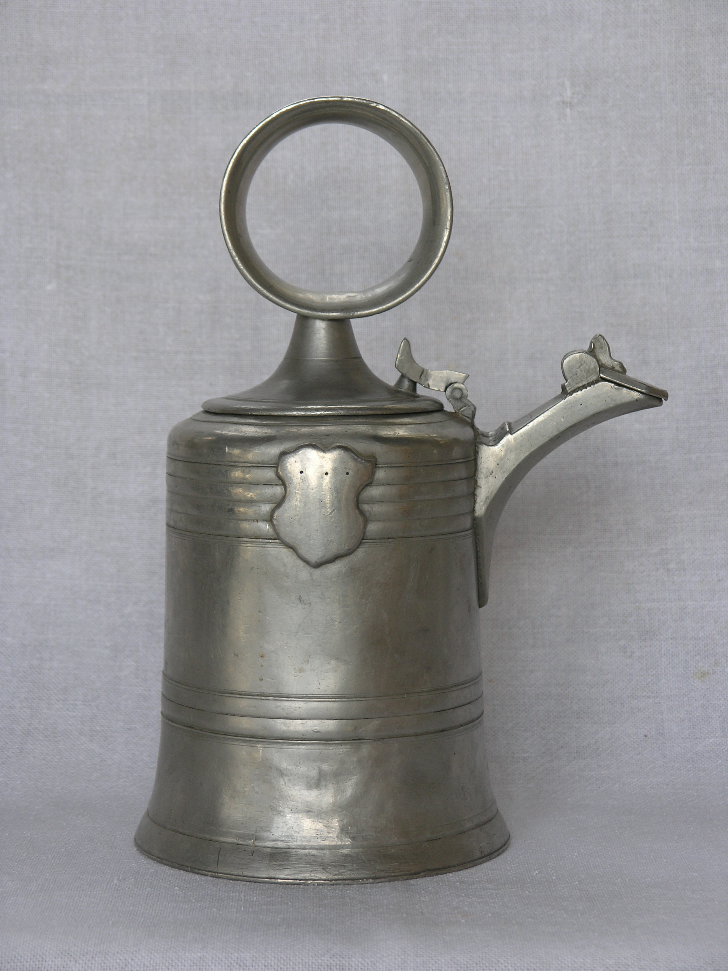 Glockenkanne von Jakob Glinz, St.Gallen